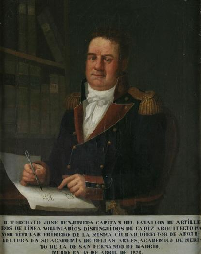 Retrato del arquitecto neoclasicista español Torcuato Benjumeda (1757-1836).